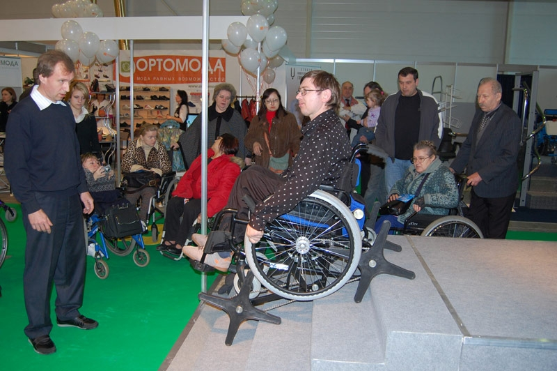 Коляска российских изобретателей, способная перемещаться по лестницам и бордюрам